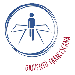 Logo della GiFra d'Italia dal 2017